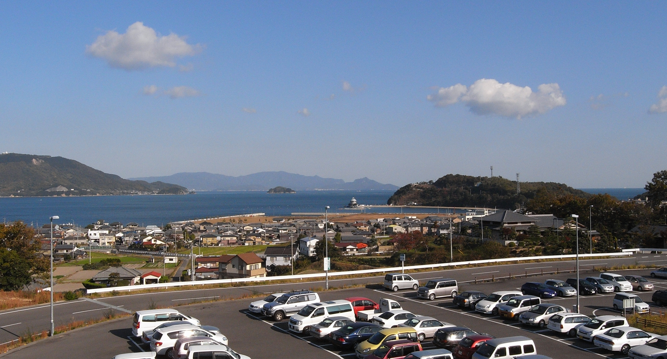 津田の松原サービスエリアから見た津田湾（香川県さぬき市）